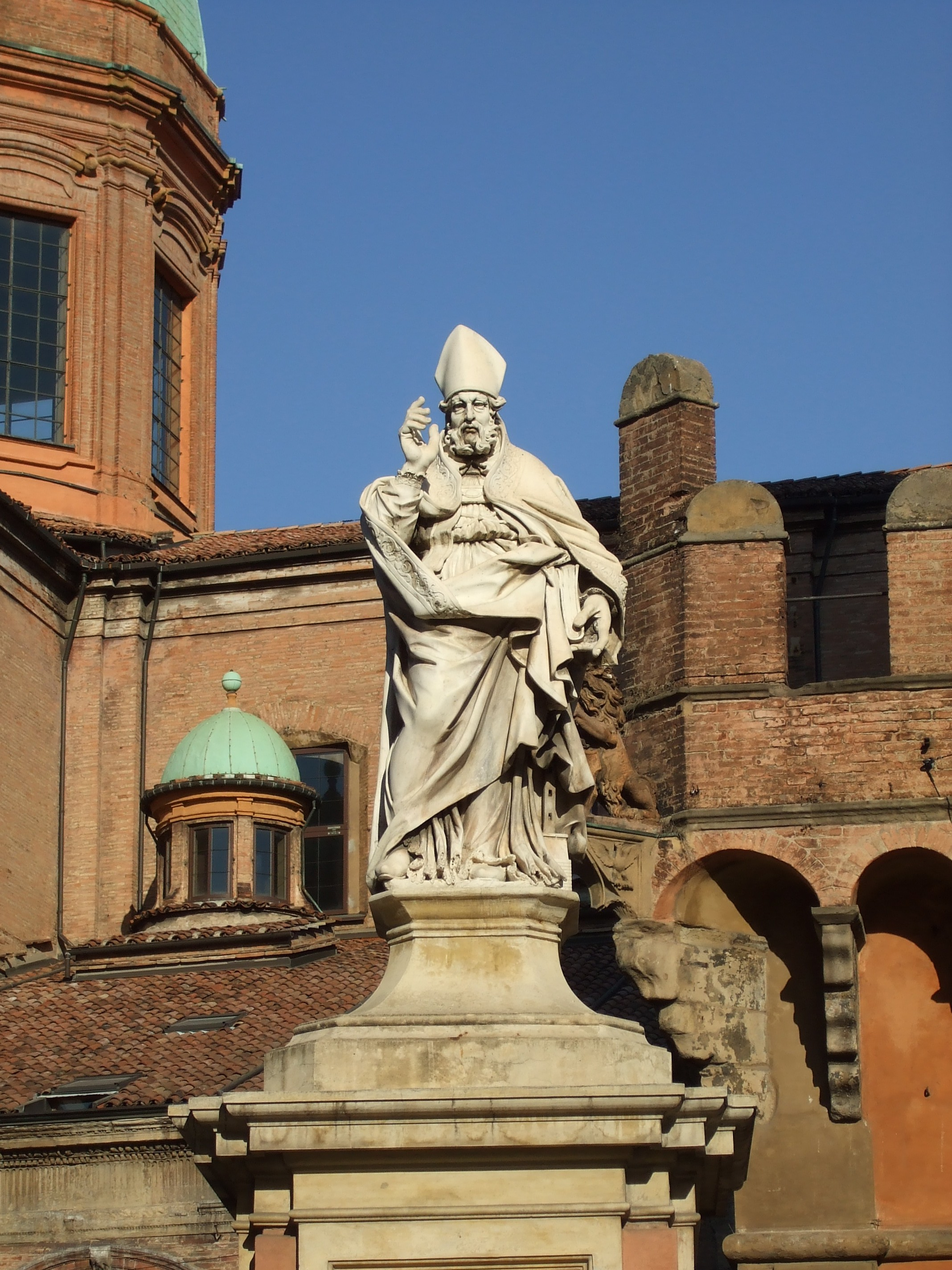 Gabriele Brunelli, San Petronio, marmo, 1680, piazza di Porta Ravegnana, Bologna Estatua de San Petronio en Bolonia, Italia.